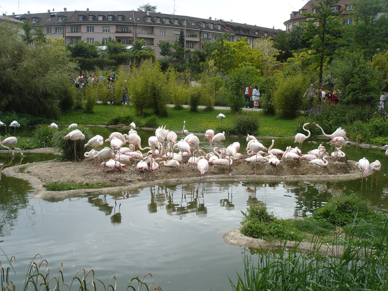 Flamingos im Zoo Basel